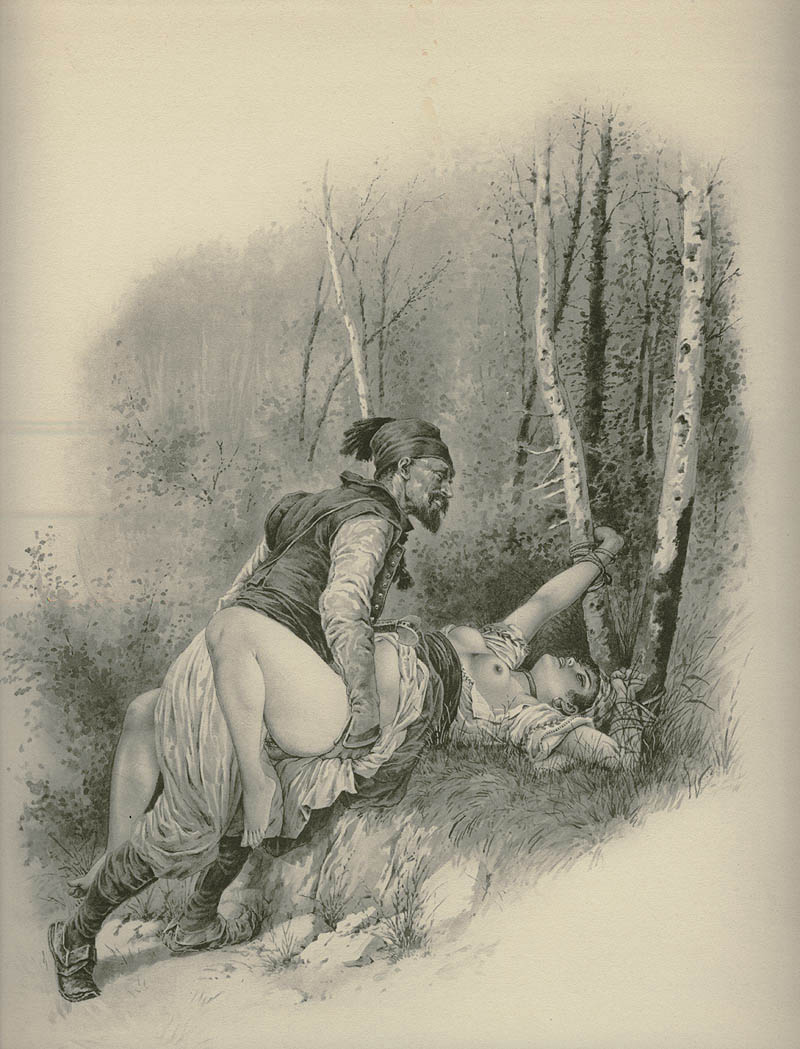 Balkangreuel